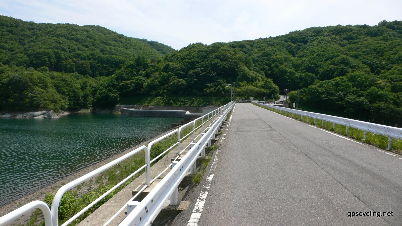 羽鳥ダムの天端を通る福島県道37号白河羽鳥線（白河羽鳥レイクライン）